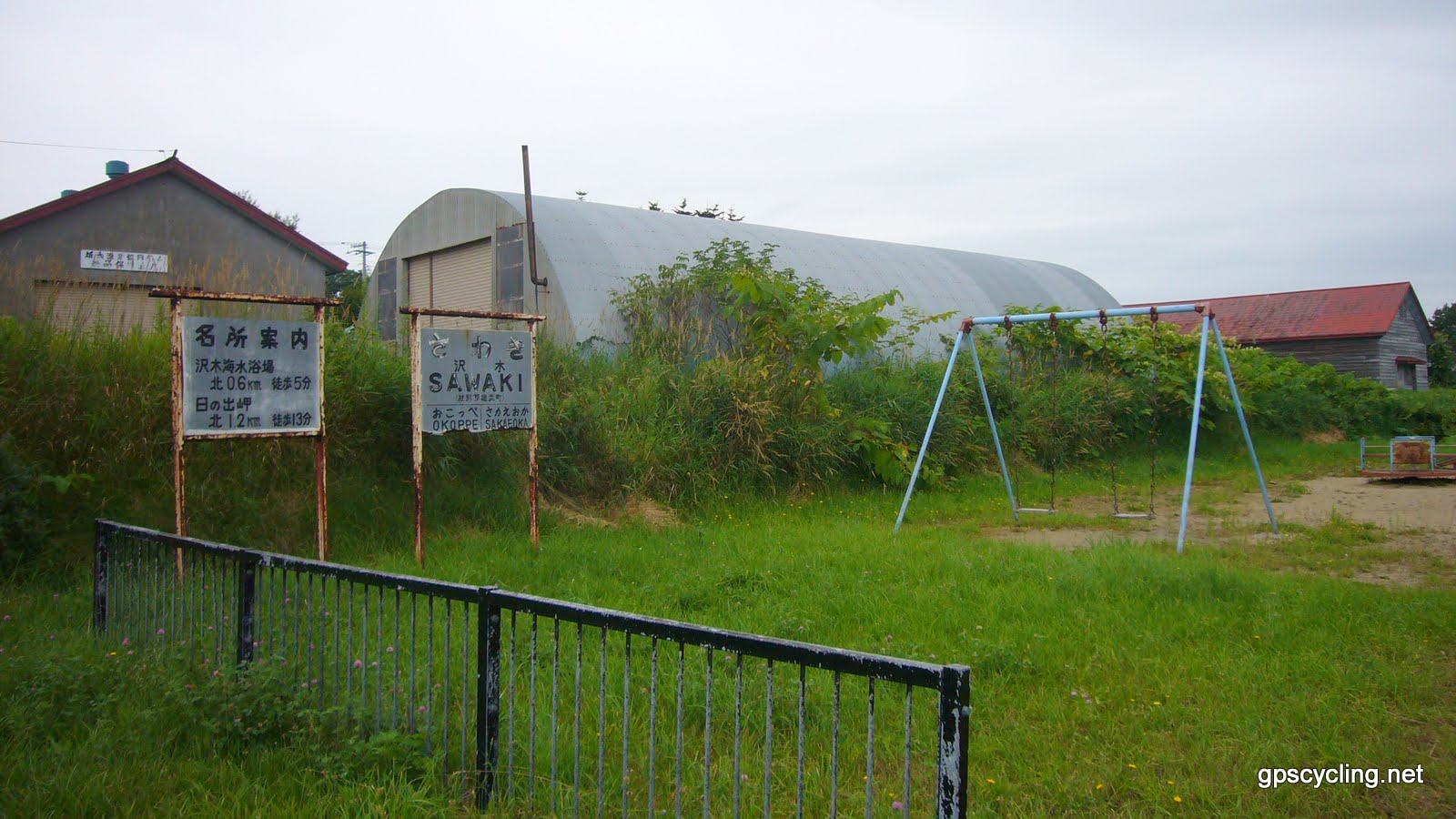 沢木駅跡